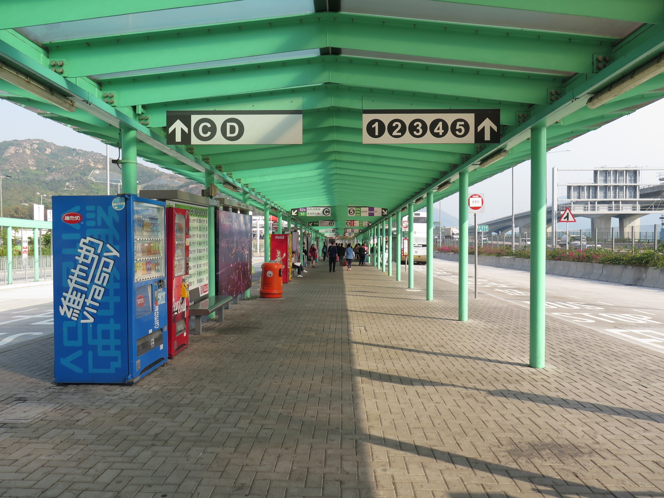 Tuen Mun Road Bus Interchange